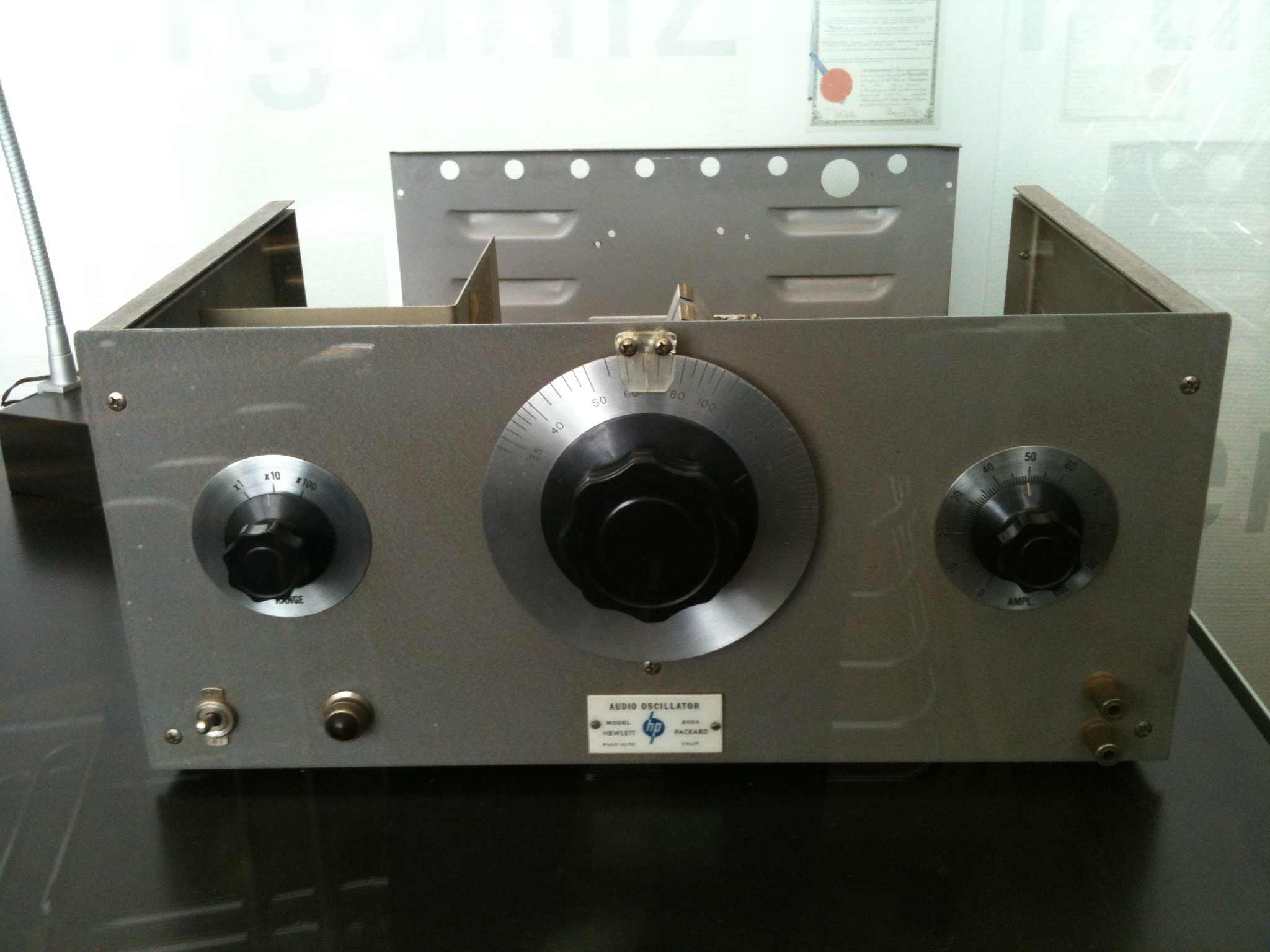 Hewlett-Packard HP200A audio oscillator